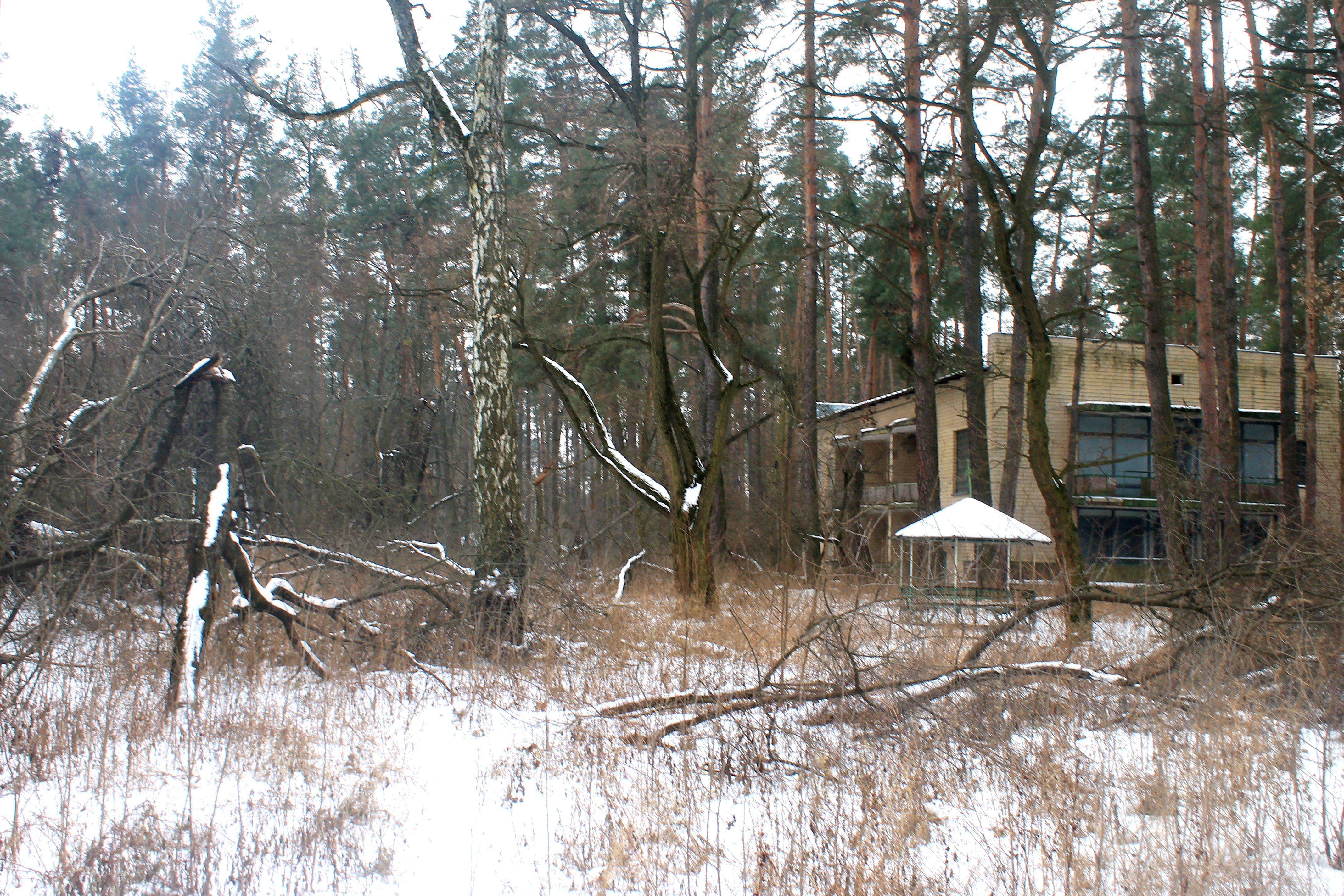 Будинок творчості композиторів Ворзель, 2014